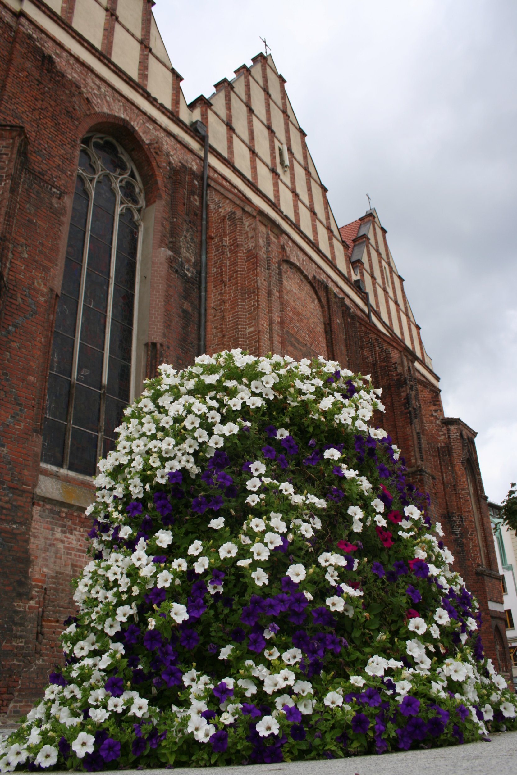 Elbląg - wieża kwiatowa przed katedrą św. Mikołaja